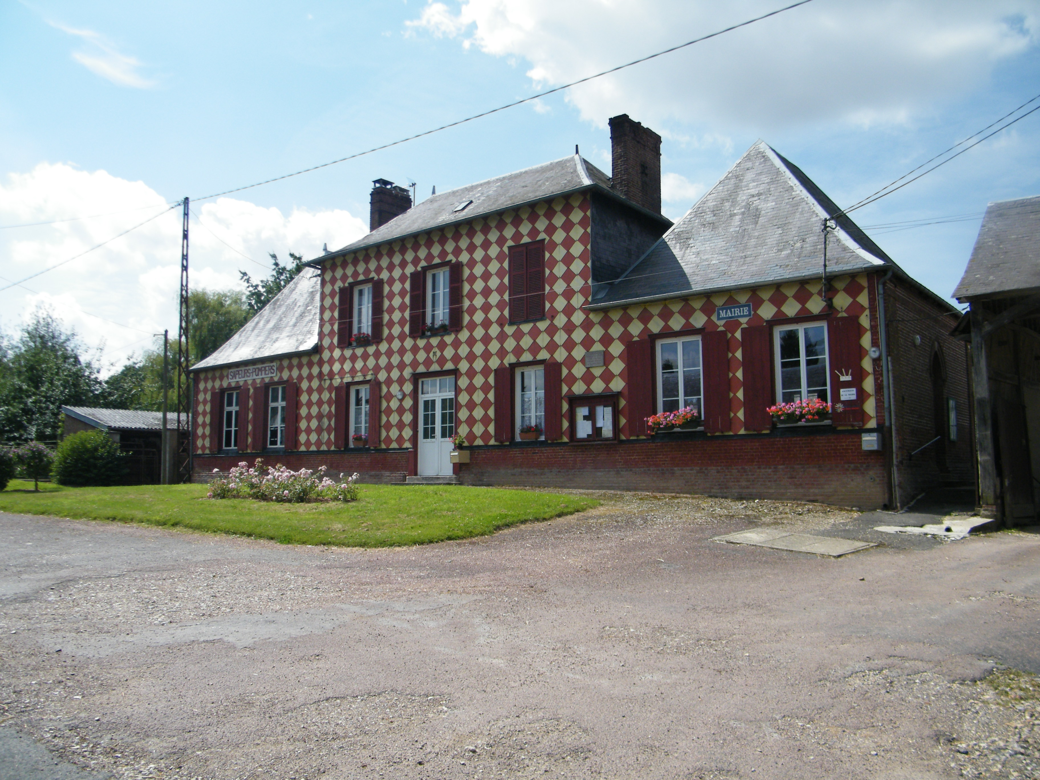 Mairie et local des sapeurs pompiers.